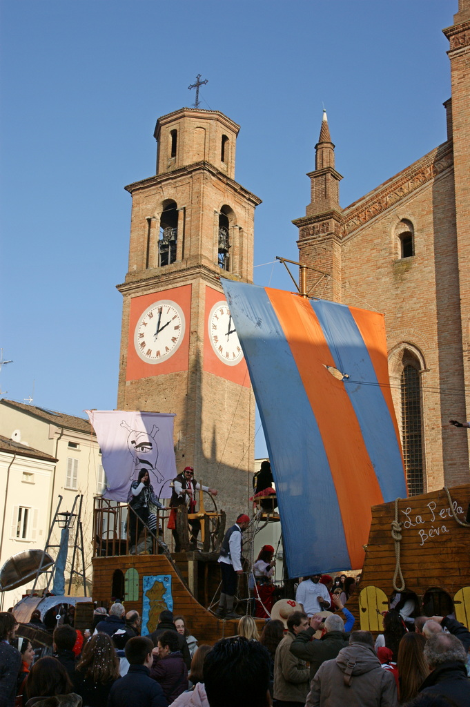 zobia 2012